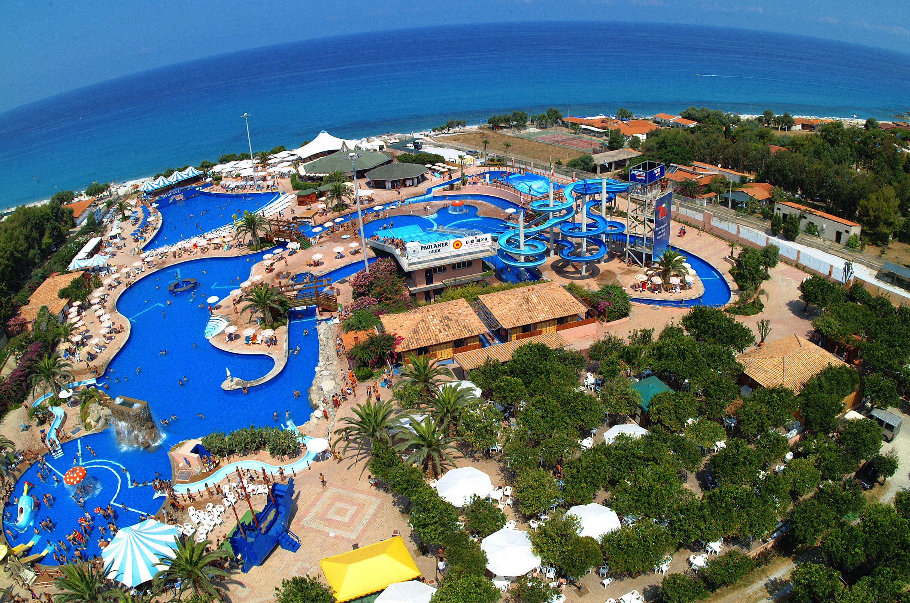 Panoramica sull'AQUAPARK di Zambrone